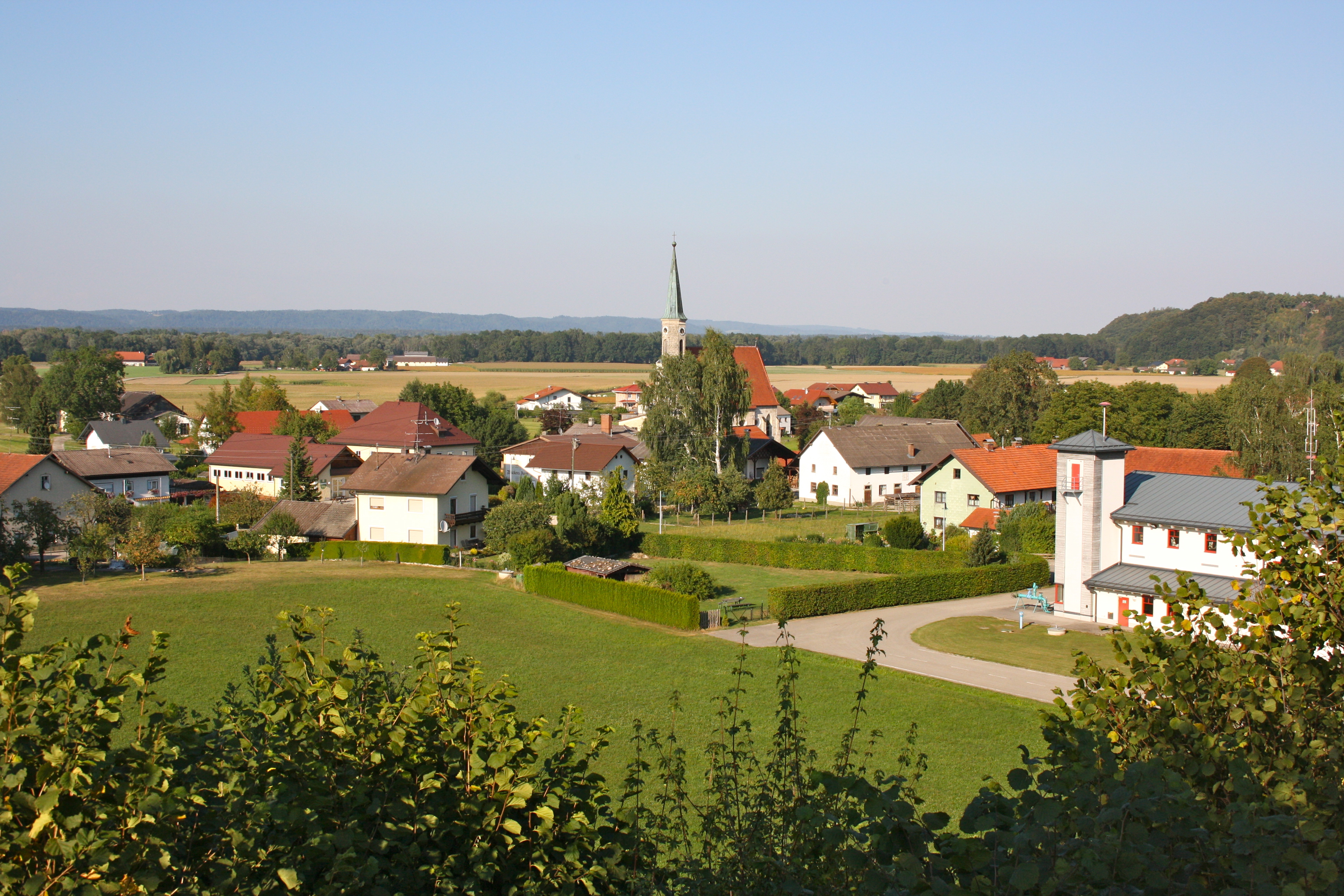 Ortsansicht von Überackern.